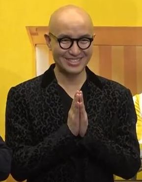 tvN '현지에서 먹힐까' 제작 발표회